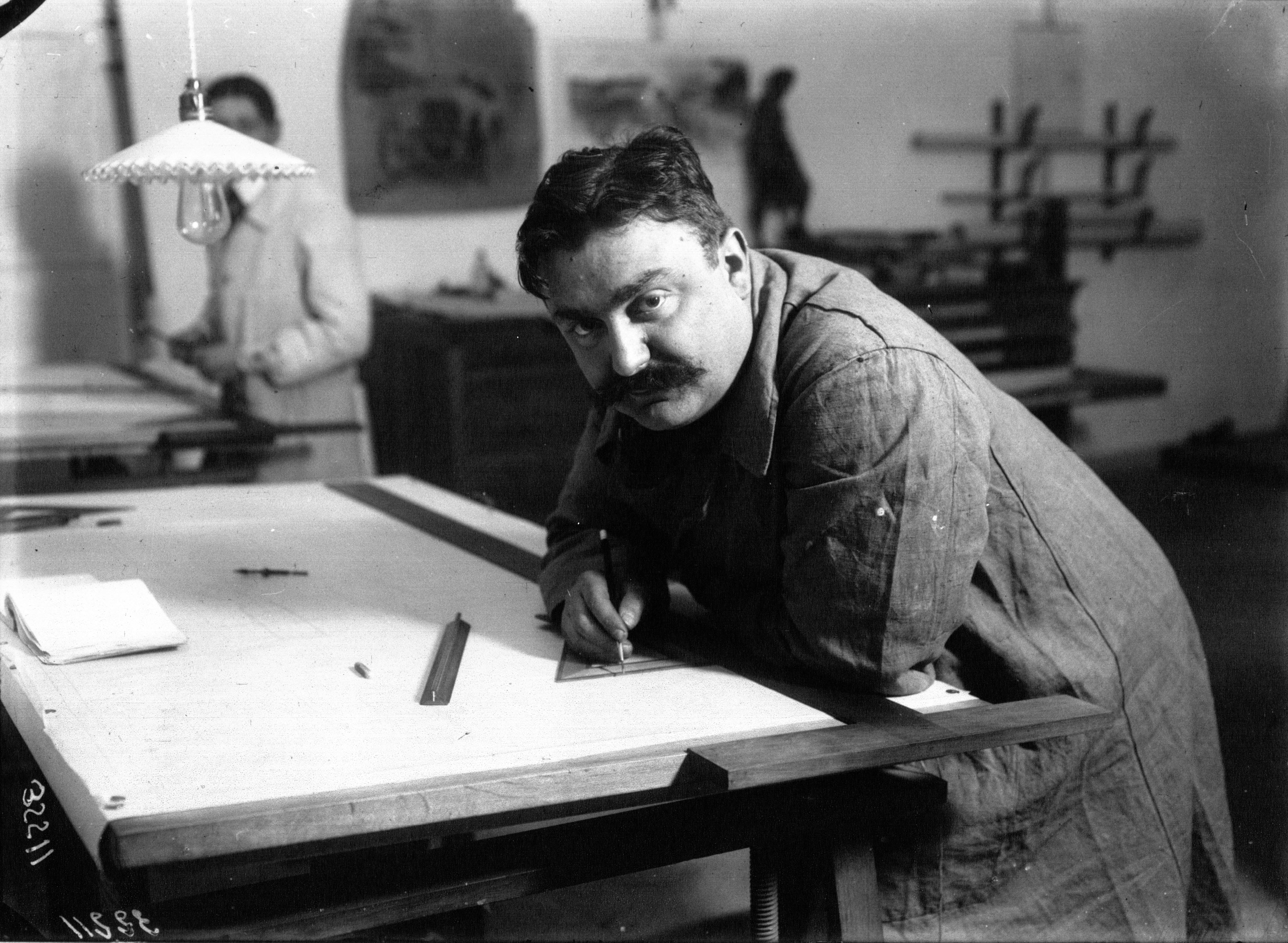 Rare photo d'un des membres des "Charlatans" de l'équipe Peugeot